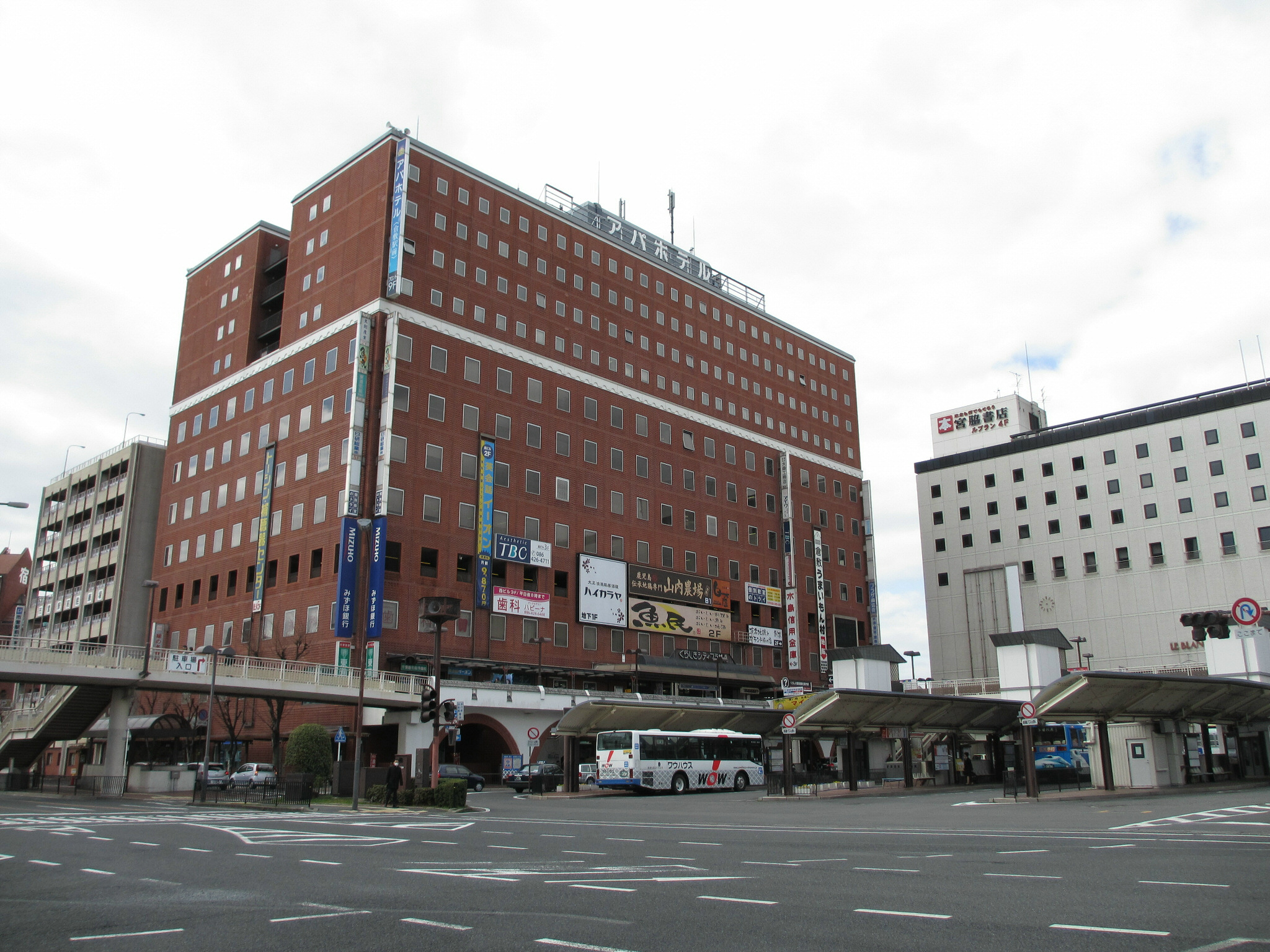 APA Hotel Kurashiki Ekimae